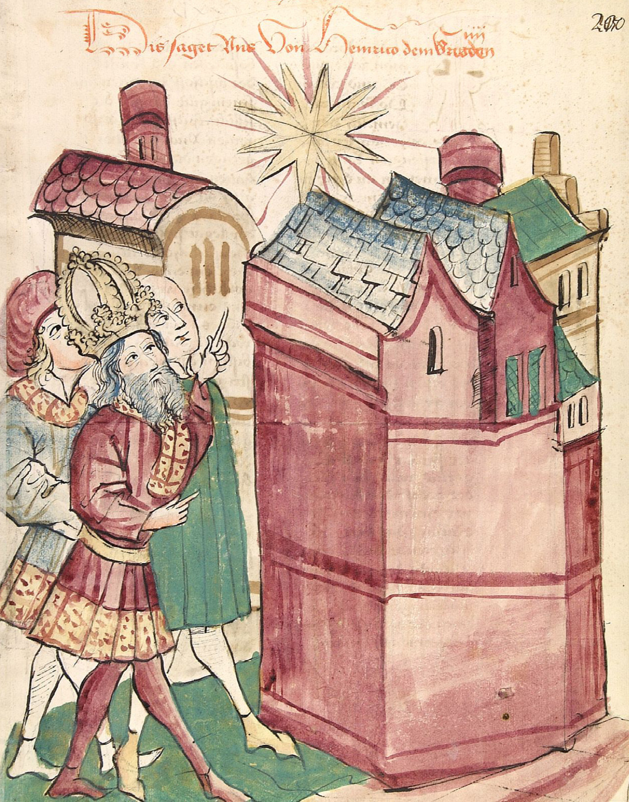 Heinrich III. sieht den neuen Stern über der Stadt Tivoli (Tyburtina) Werkstatt des Diebold Lauber unbekannter Künstler, um 1450 Buchschmuck Zeichnung (ganzseitig),ungerahmt Technik Feder & koloriert Farben Wasserfarbe & Deckfarbe Kaiser Heinrich III. sieht in Begleitung von zwei weiteren Personen den neu aufgegangenen Stern über den Dächern der Stadt Tyburnia (Tivoli) und zeigt auf ihn. Abweichende Angaben der Überschrift bezeichnen den dargestellten Kaiser irrtümlich als Heinrich IV.